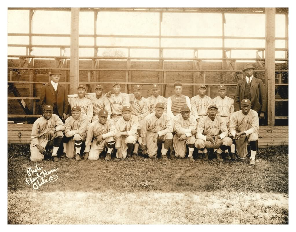 1921 Hilldale Club